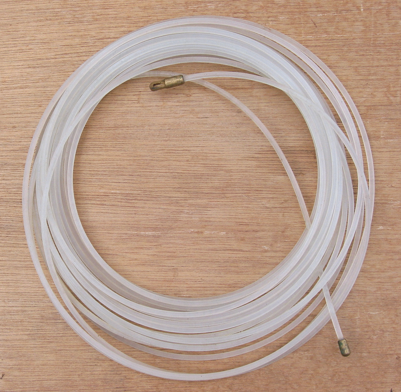 Draadtrekker